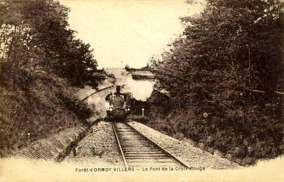 Le pont de la Croix Rouge près du village, au-dessus de la voie de la ligne de Mareuil-sur-Ourcq, permettant l'accès au Bois du Roi.